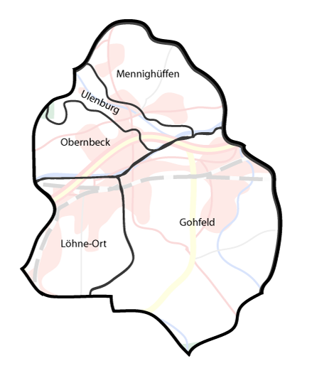 Maps of Kreis Herford (Germany) series. Shows various kinds of information including topographical, demographical, and use of land information for all communities of Kreis Herford and the district of Herford itstelf.